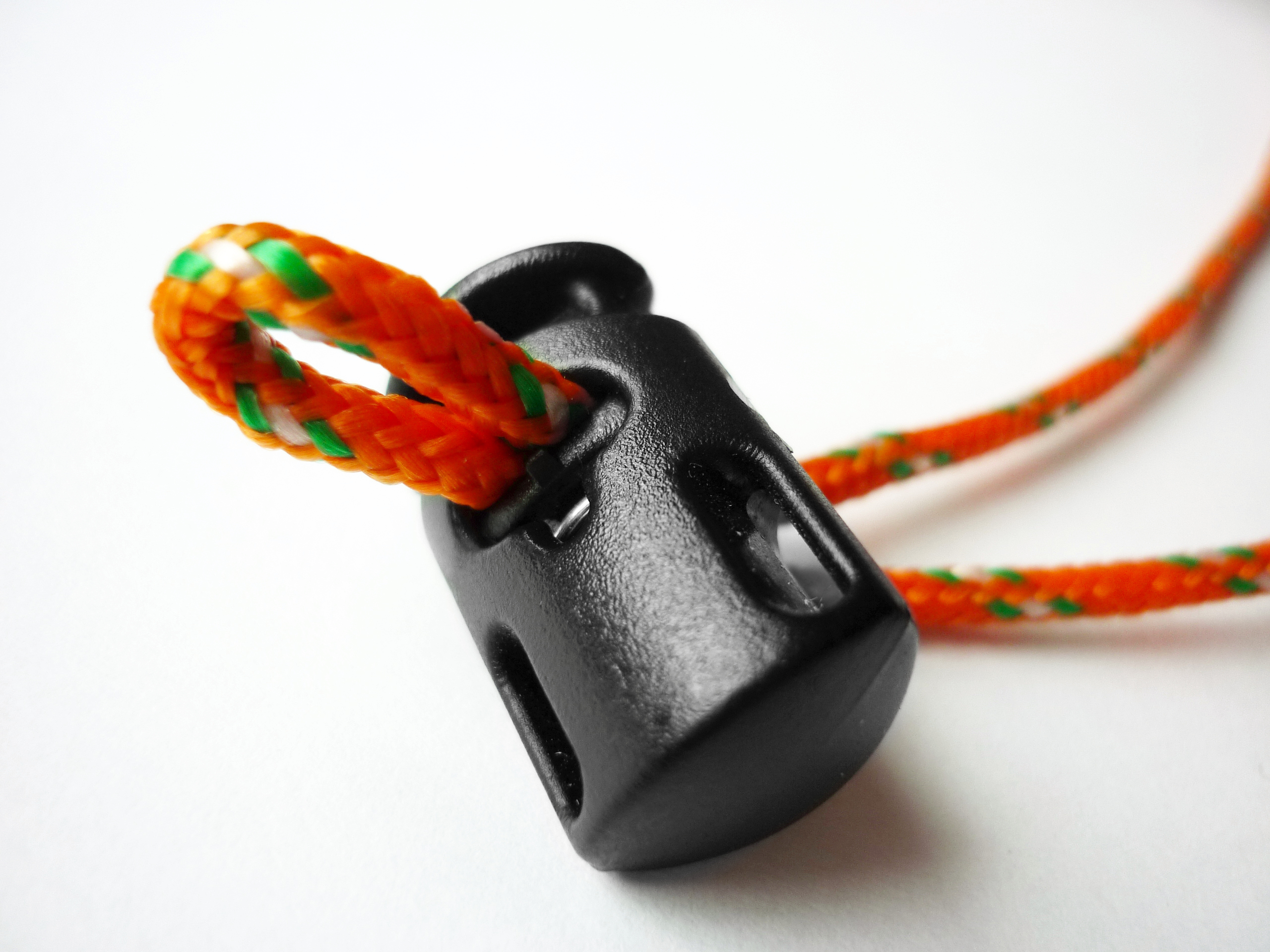 Tanka